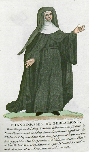 Collection de costumes de tous les ordres monastiques, supprimés à differentes époques, dans la ci-devant Belgique, Bruxelles, Philippe Joseph Maillart et sœur, 1811